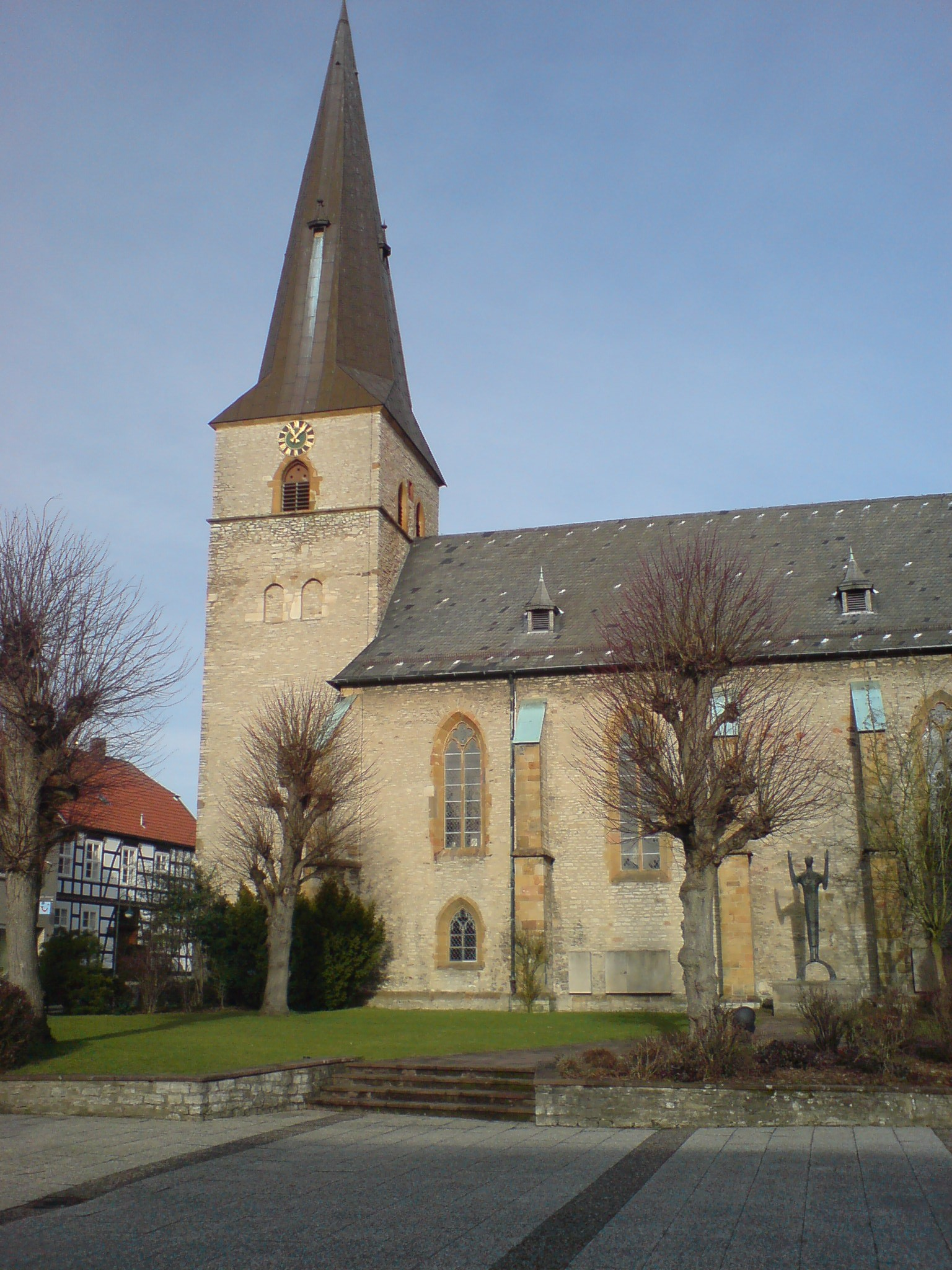 Evangelische Kirche in Werther (Westfalen)